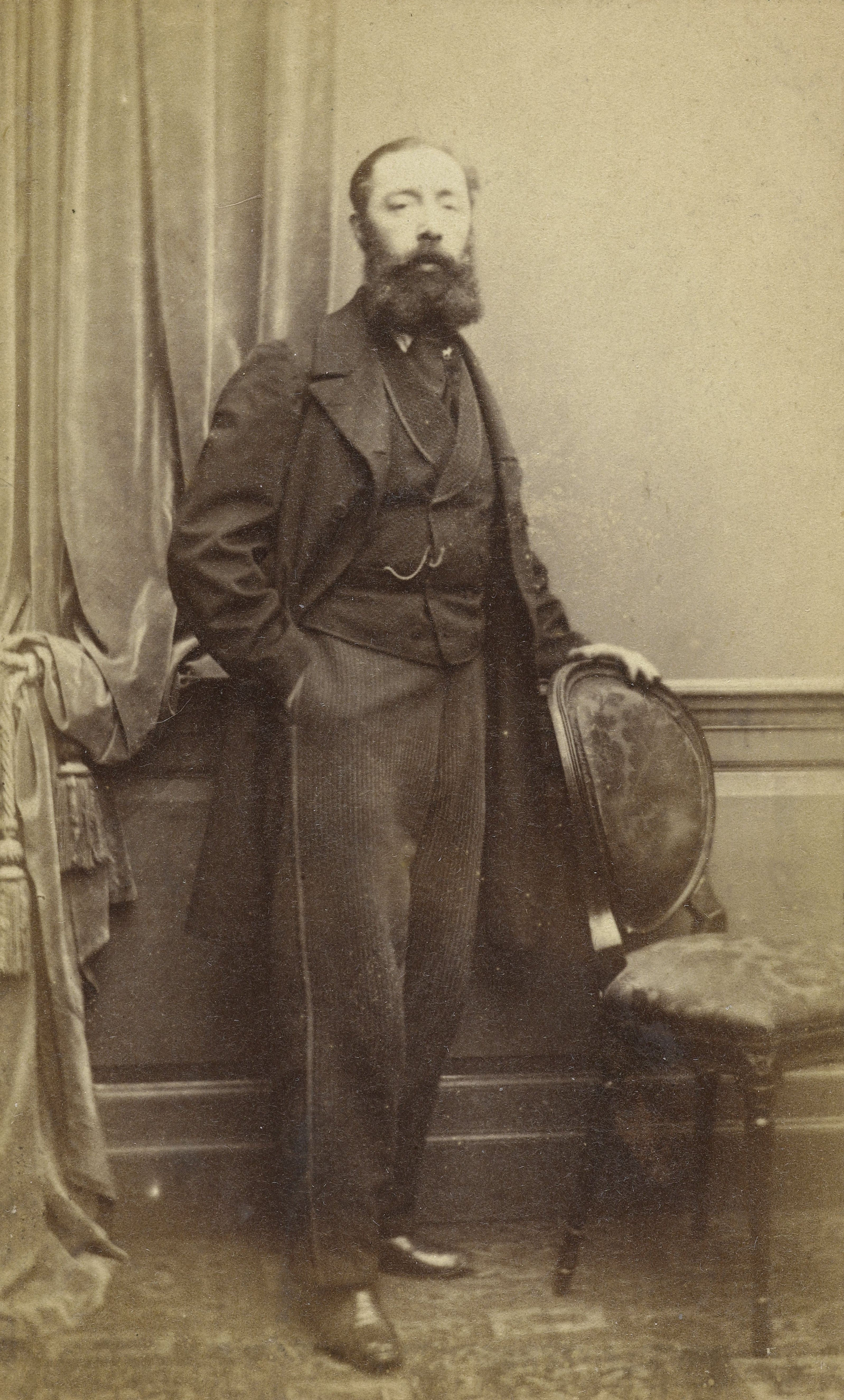 Zelfportret van Maurits Verveer. Datering 1850-1875.